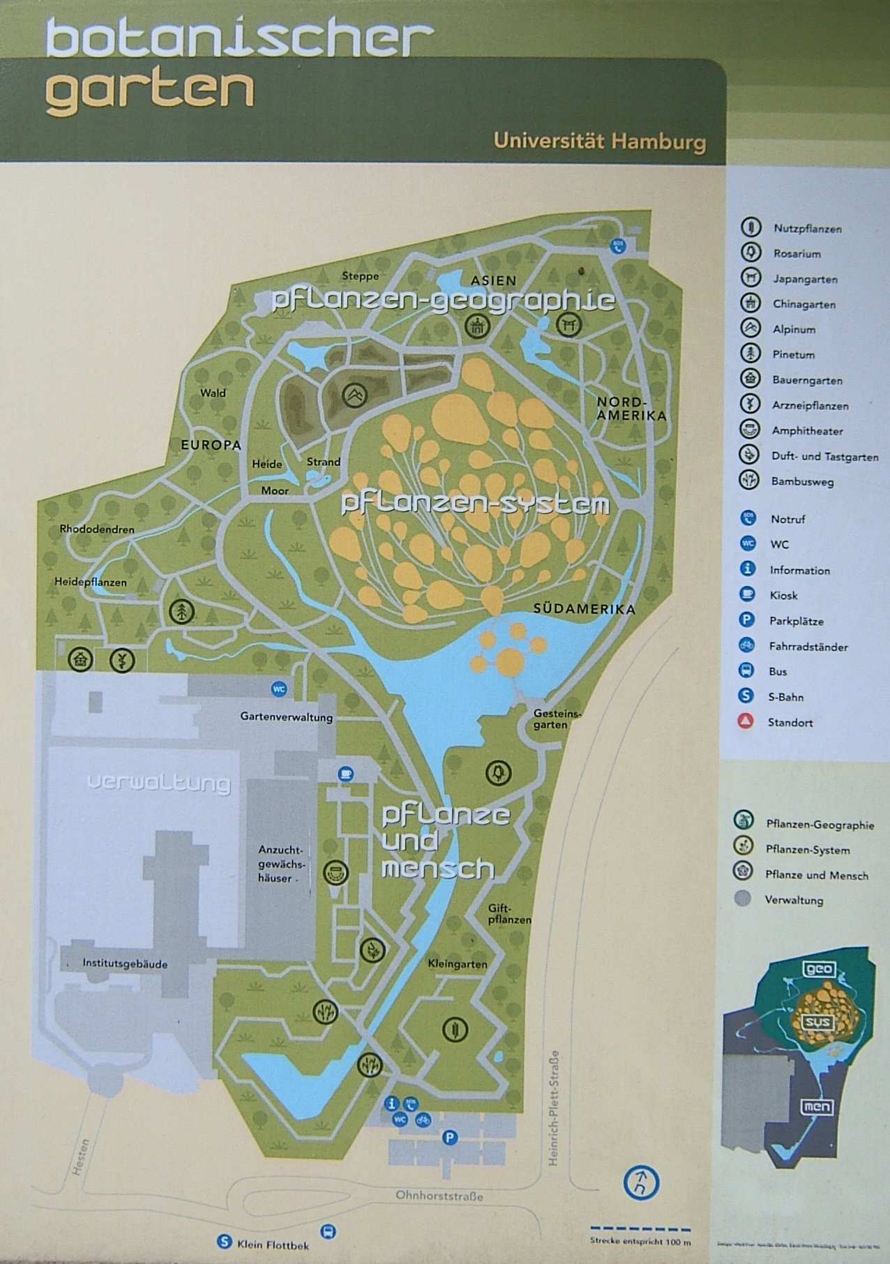 Hamburg, Klein Flottbek, Plan Botanischer Garten